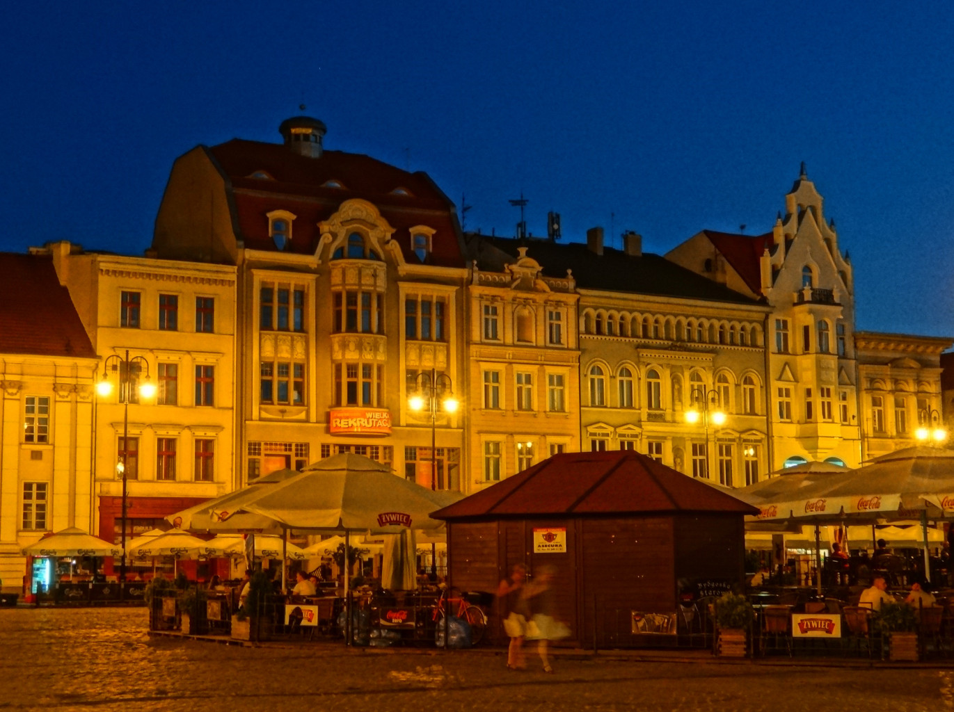 Stary Rynek w Bydgoszczy